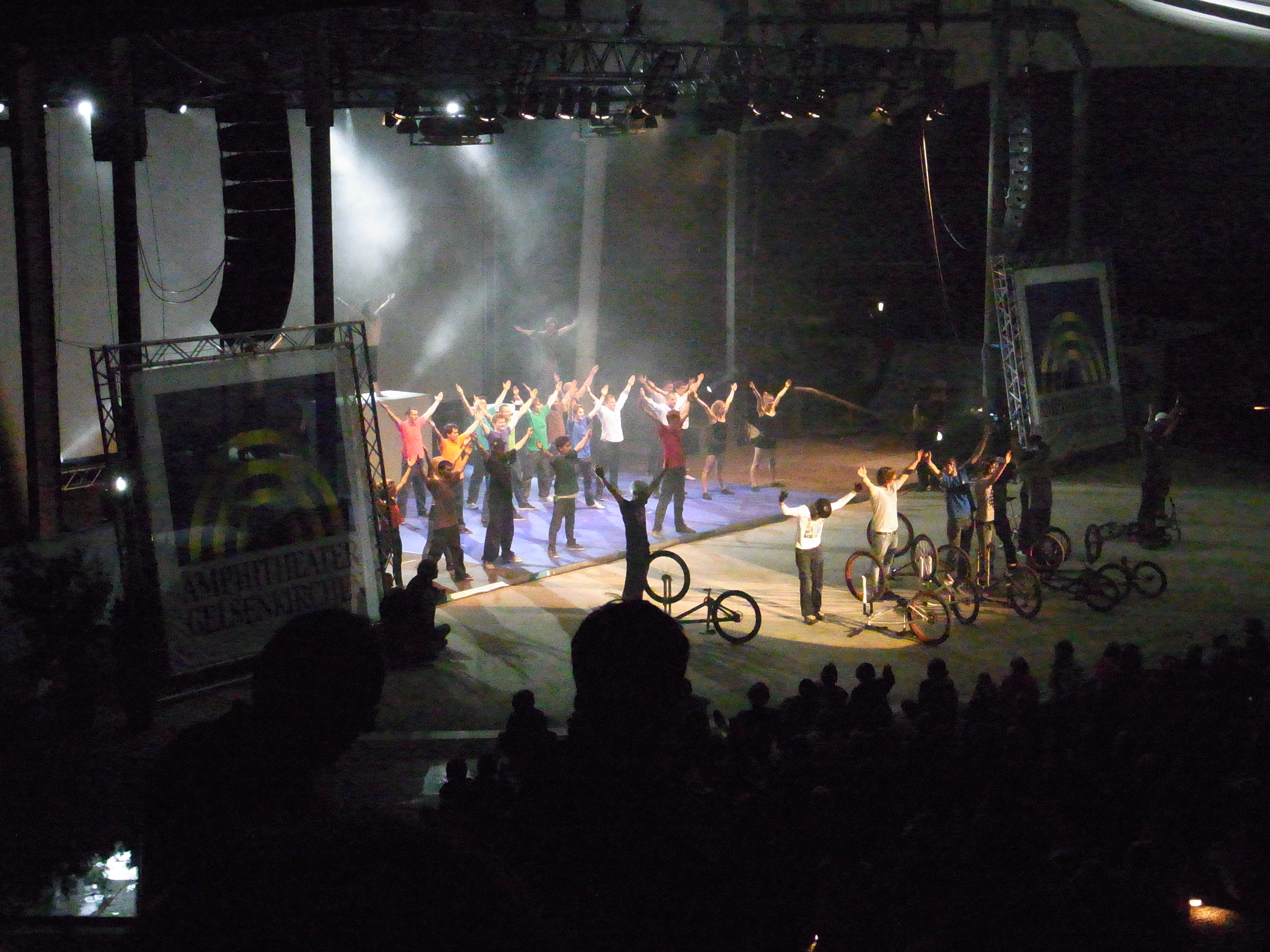 ExtraSchicht 2011, Nordsternpark: Urbanatix in der Arena